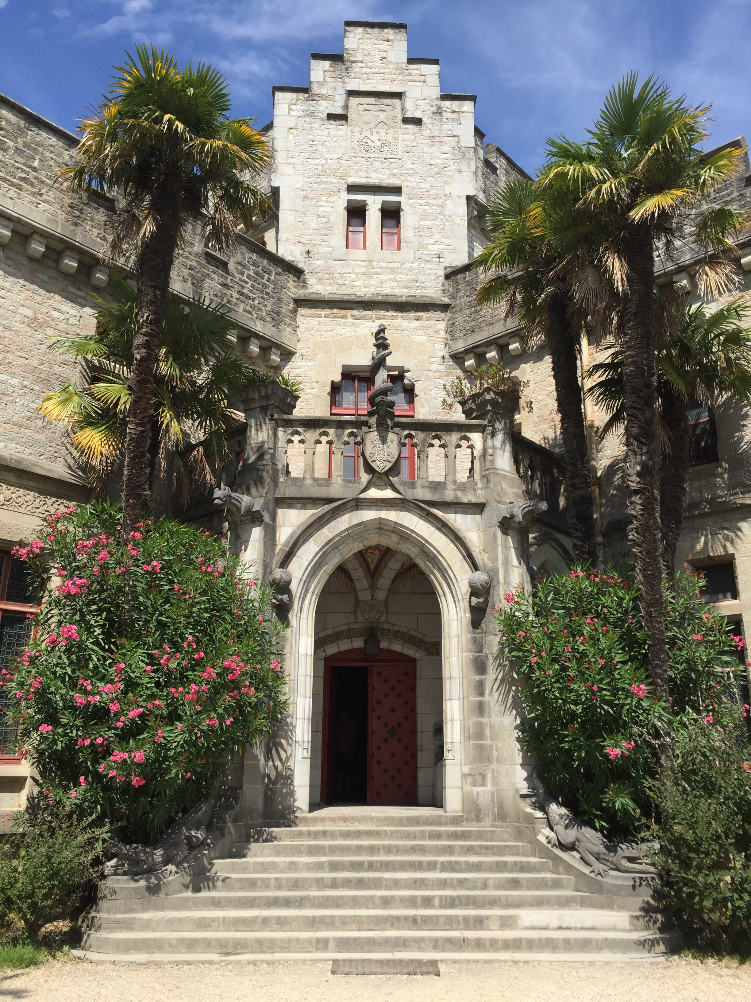 Entrée du château d'Abbadia à Hendaye